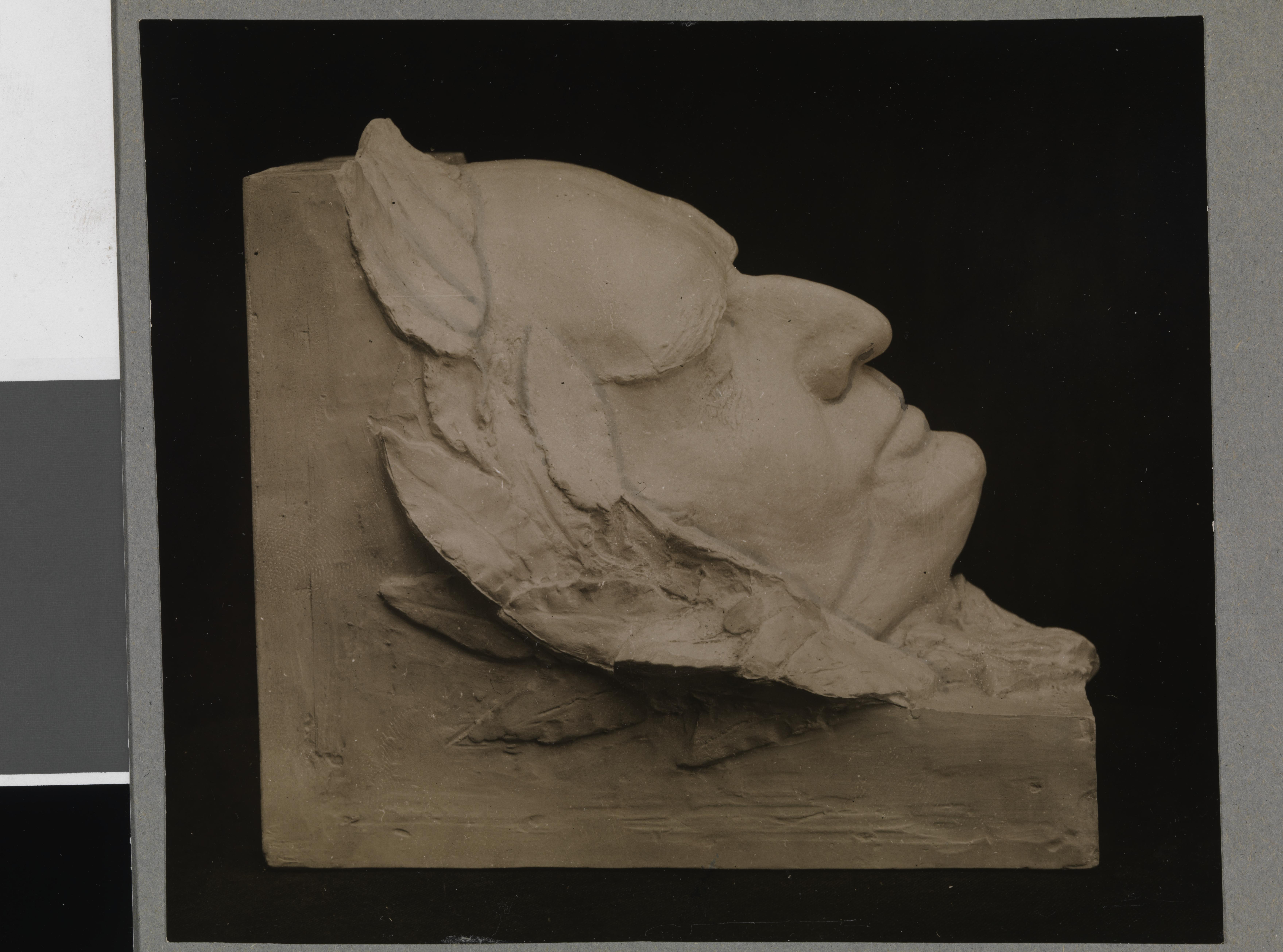 Bildet er hentet fra Nasjonalbibliotekets bildesamling. Anmerkninger til bildet var: På baksiden av komponentnummer 1 står det at dett er masken laget av Andreas Enderle, men i følge Aulestad er dette masken laget av Moreau-Vauthier Depicted person: Bjørnson, Bjørnstjerne